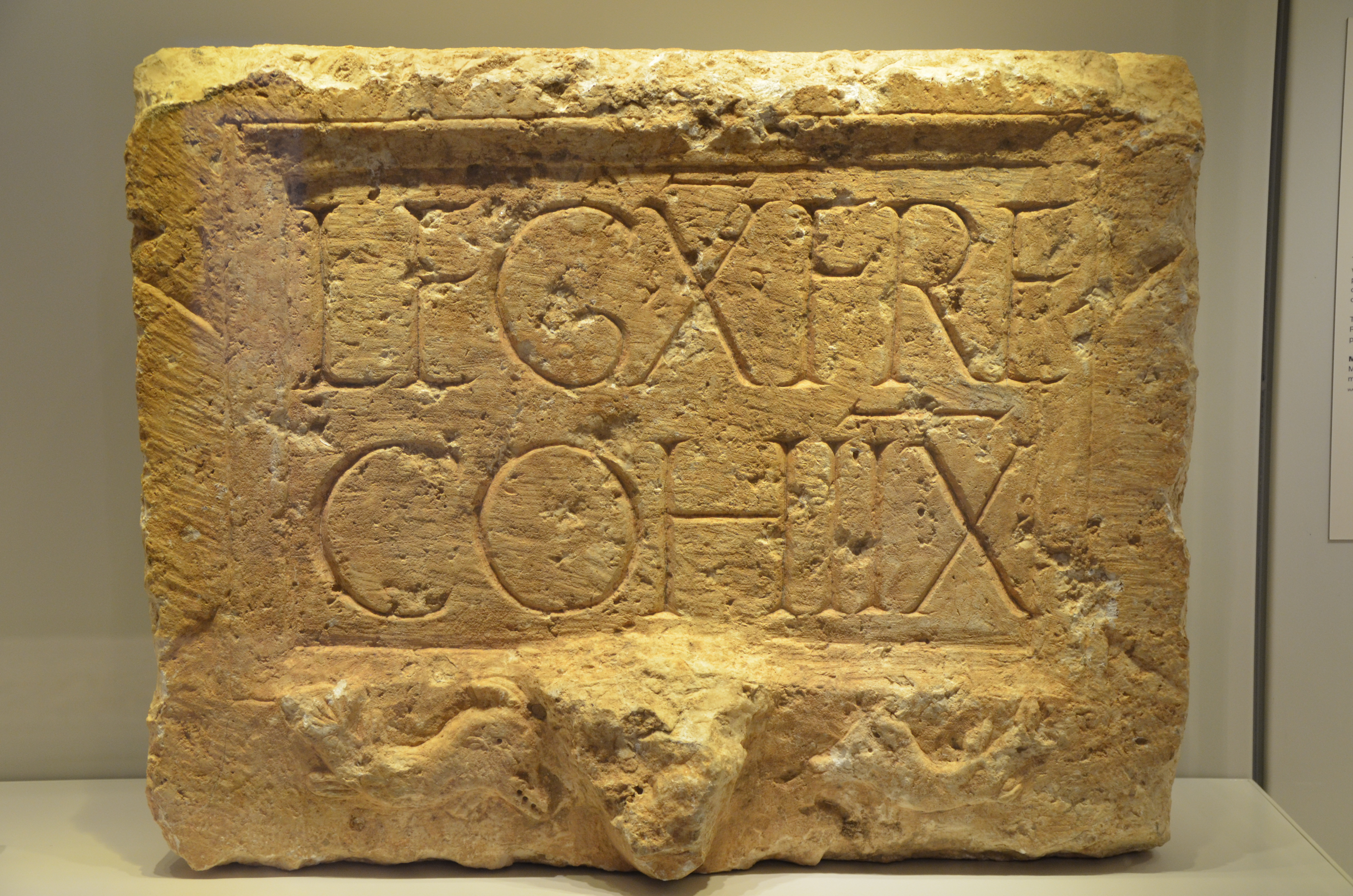 Israel Museum, Jerusalem